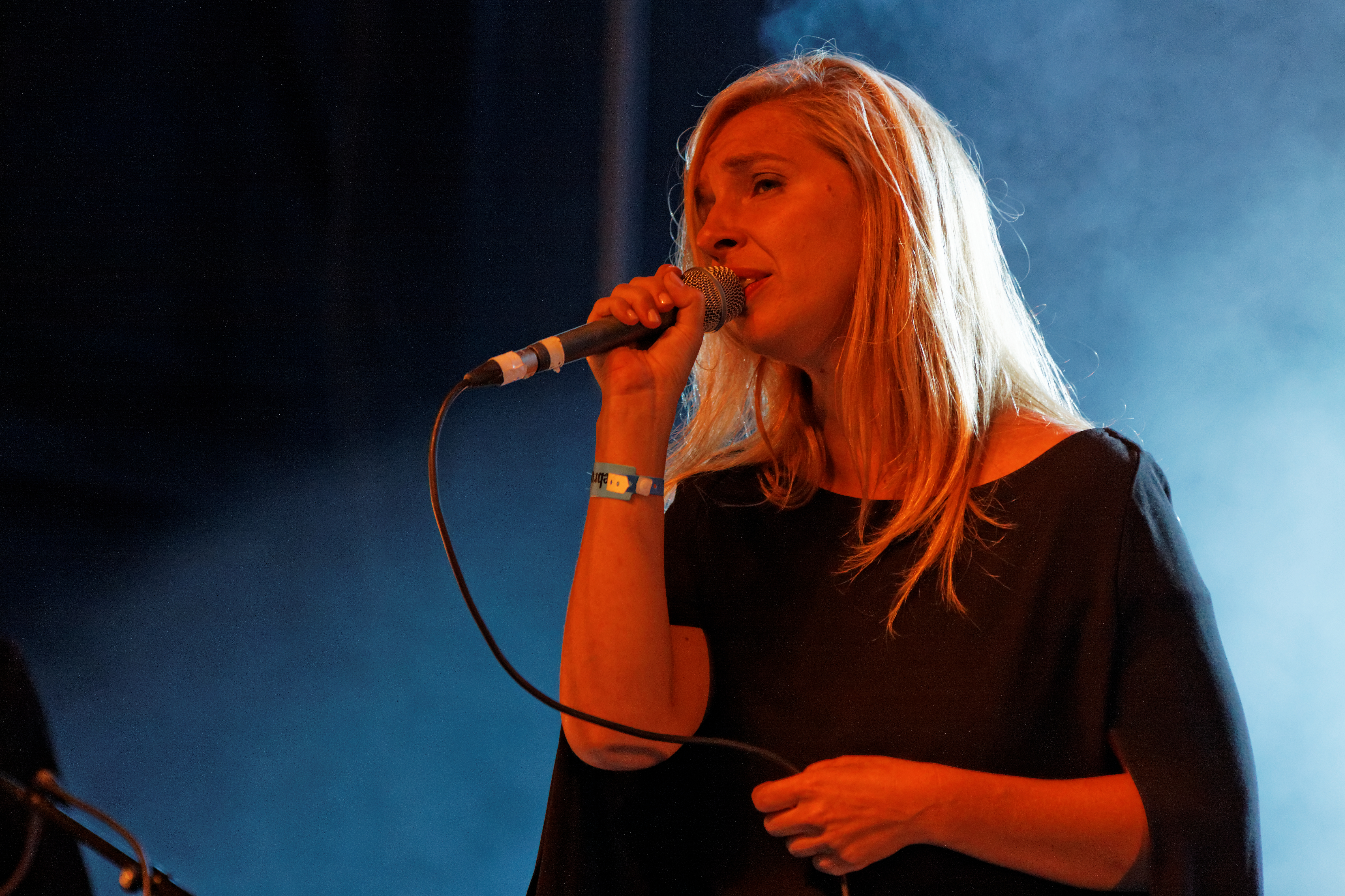 Barbara Carlotti en concert sur la scène Zebrock lors de la fête de l'Humanité 2012.